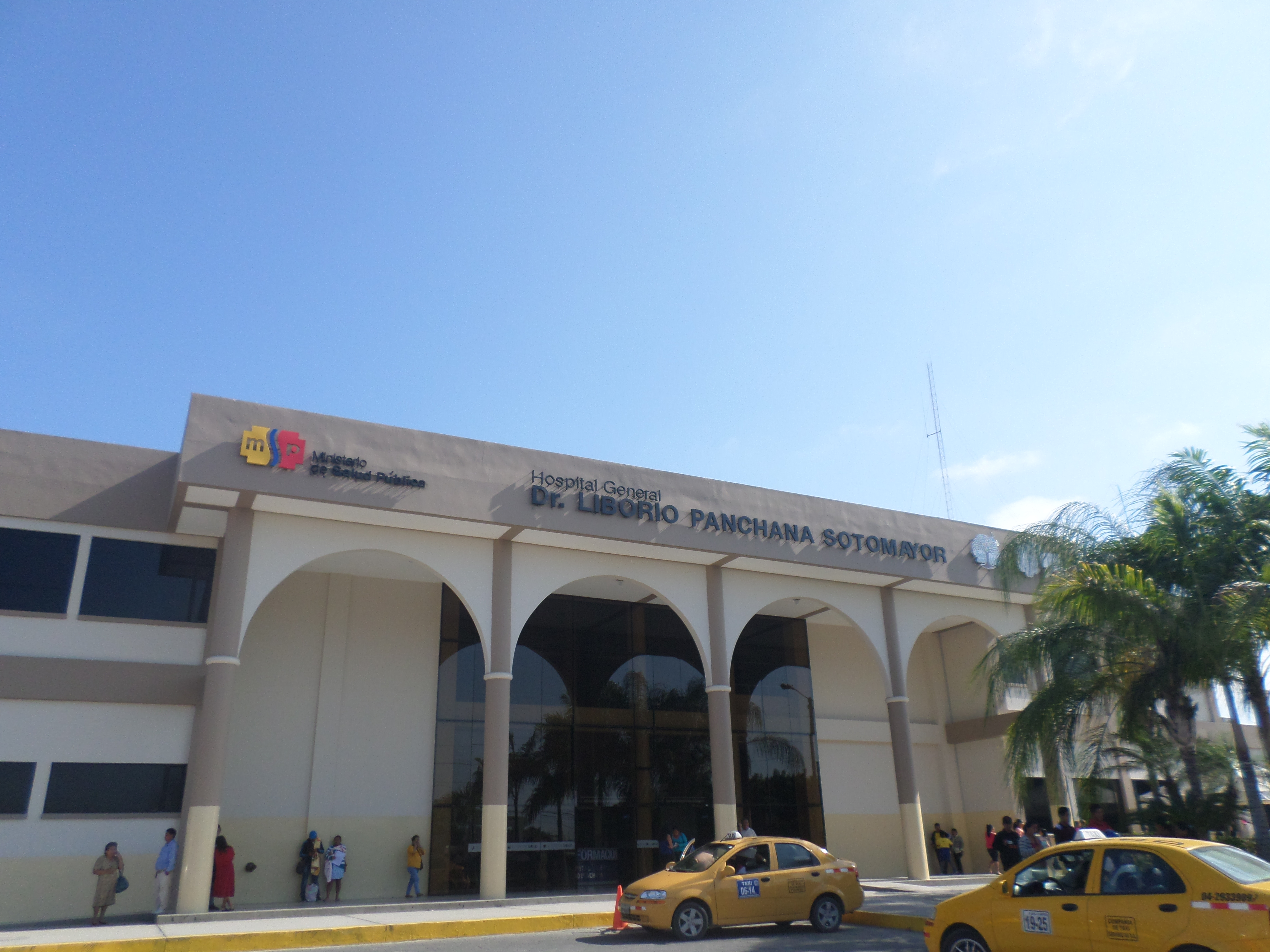 Vista del hospital desde la zona de estacionamiento